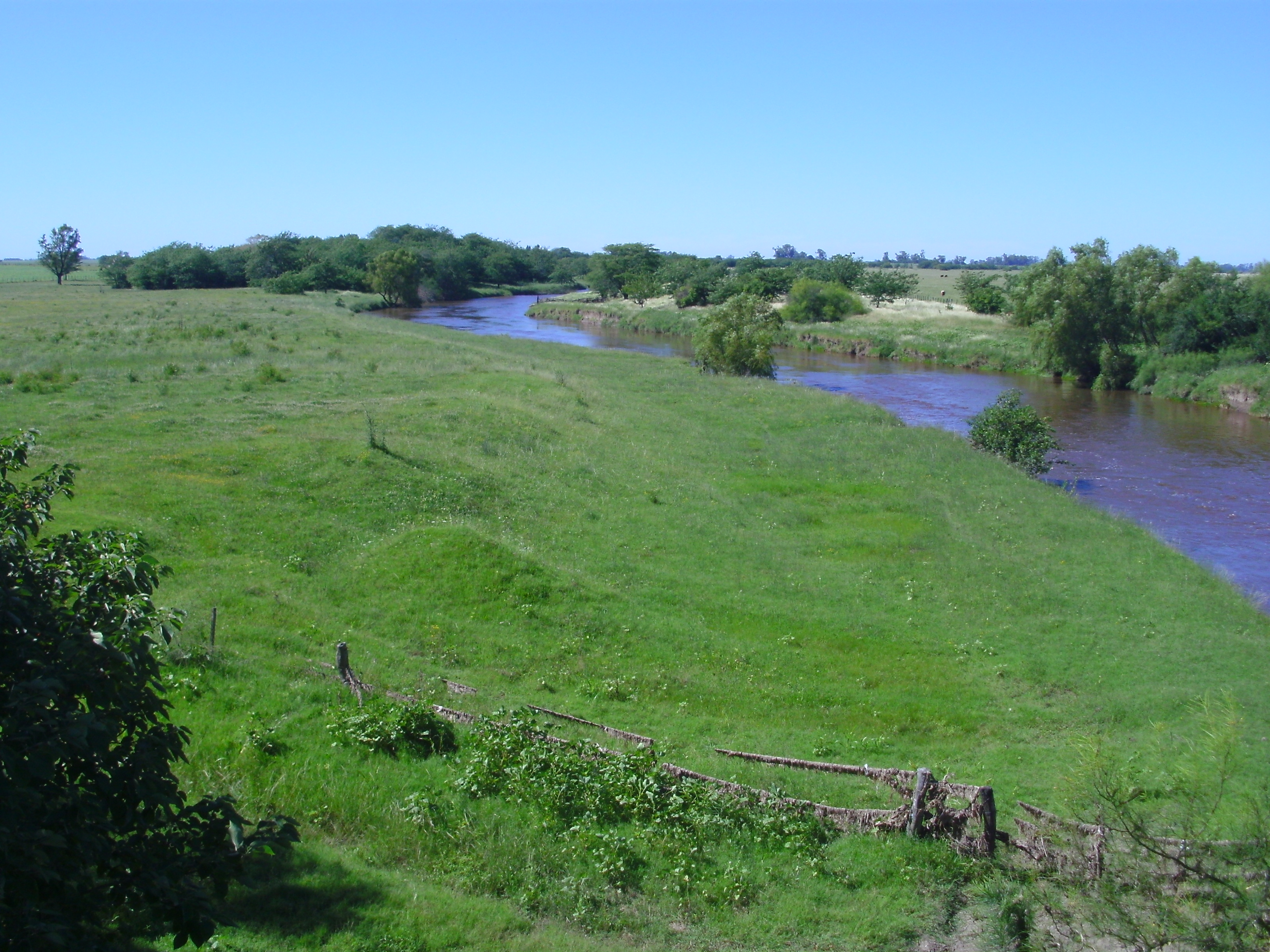 Arroyo del Medio, límite natural entre Santa Fe y Buenos Aires